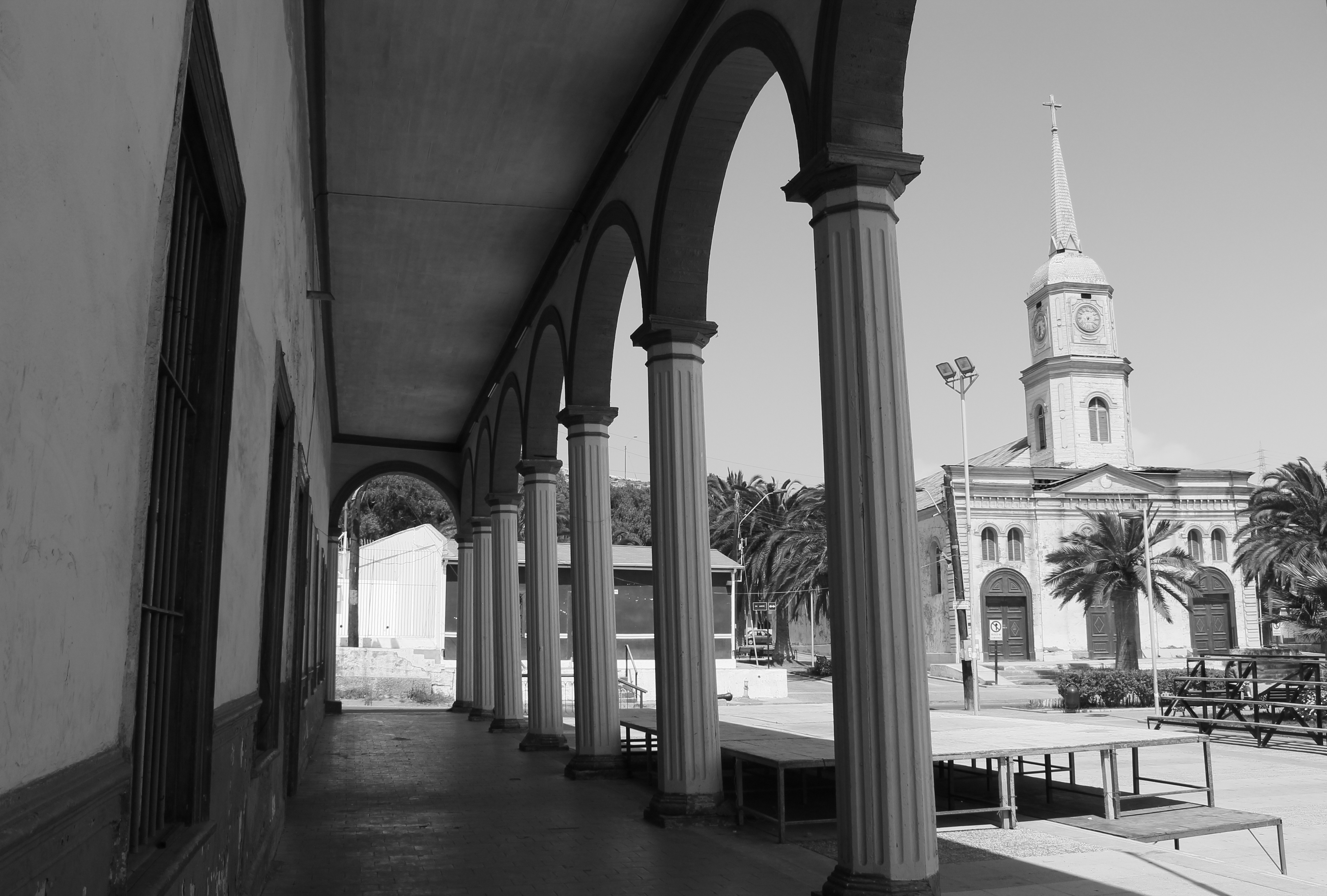 Freirina es una comuna ubicada en la provincia de Huasco, III Región. La Iglesia Santa Rosa de Lima, es uno de los Monumentos Nacionales que posee esta hermosa comuna que se ha caracterizado desde la Colonia, por la extracción de minerales. This is a photo of a national monument in Chile: 338